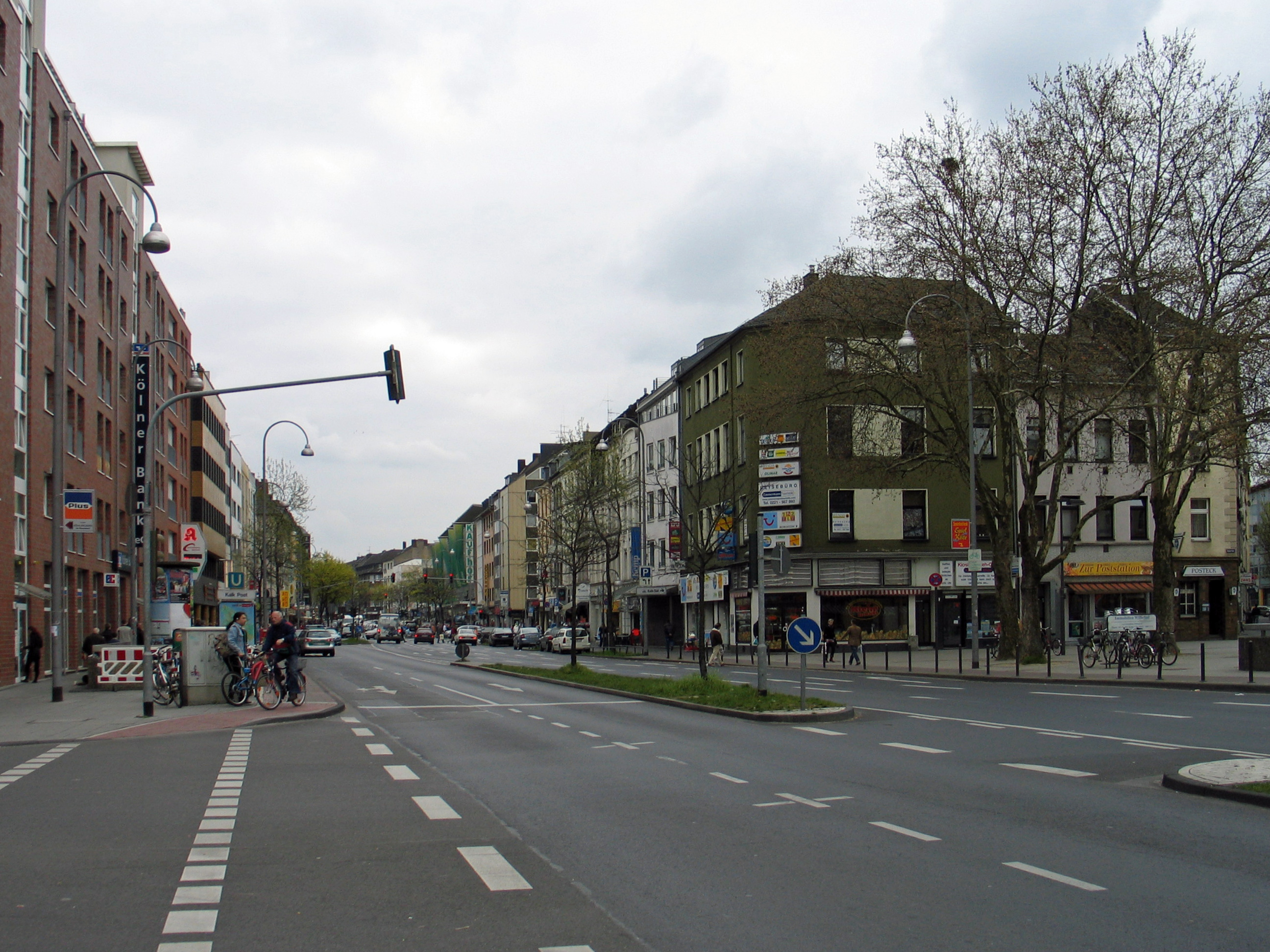 Kalker Hauptstraße